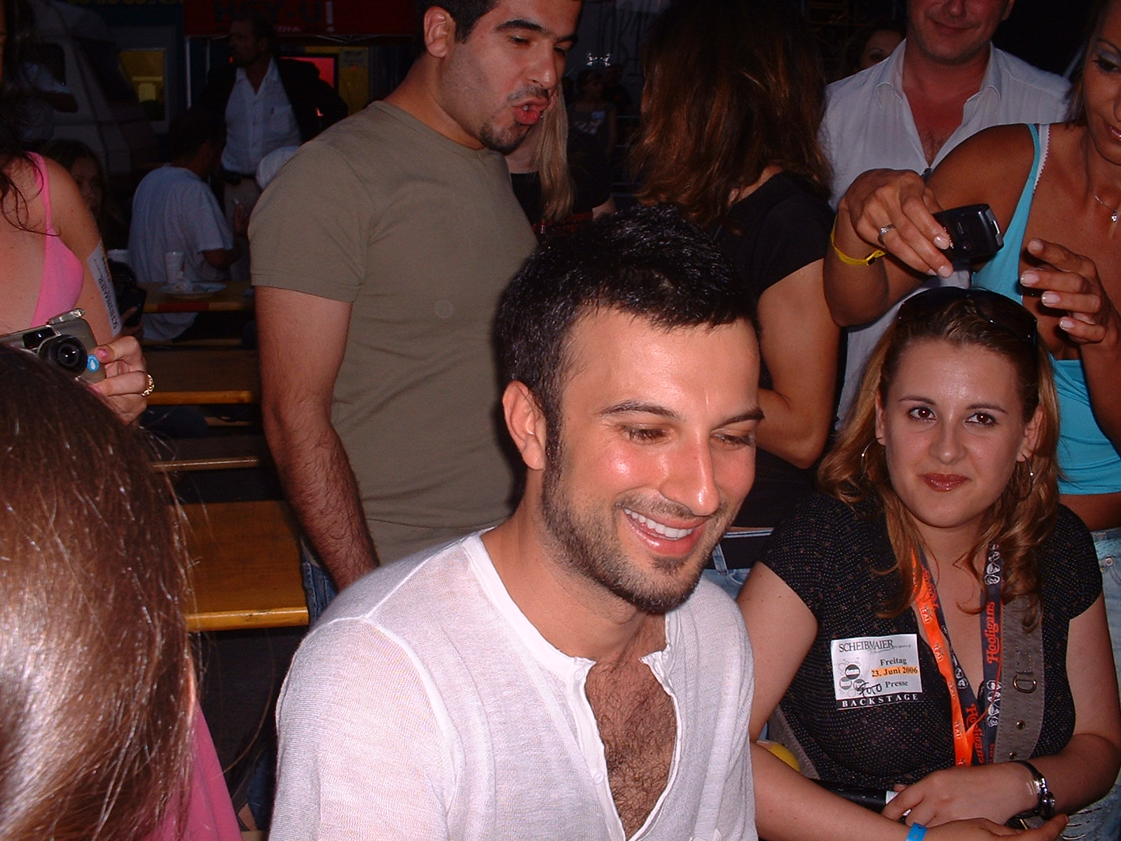 Tarkan among fans in Vienna, 2006.